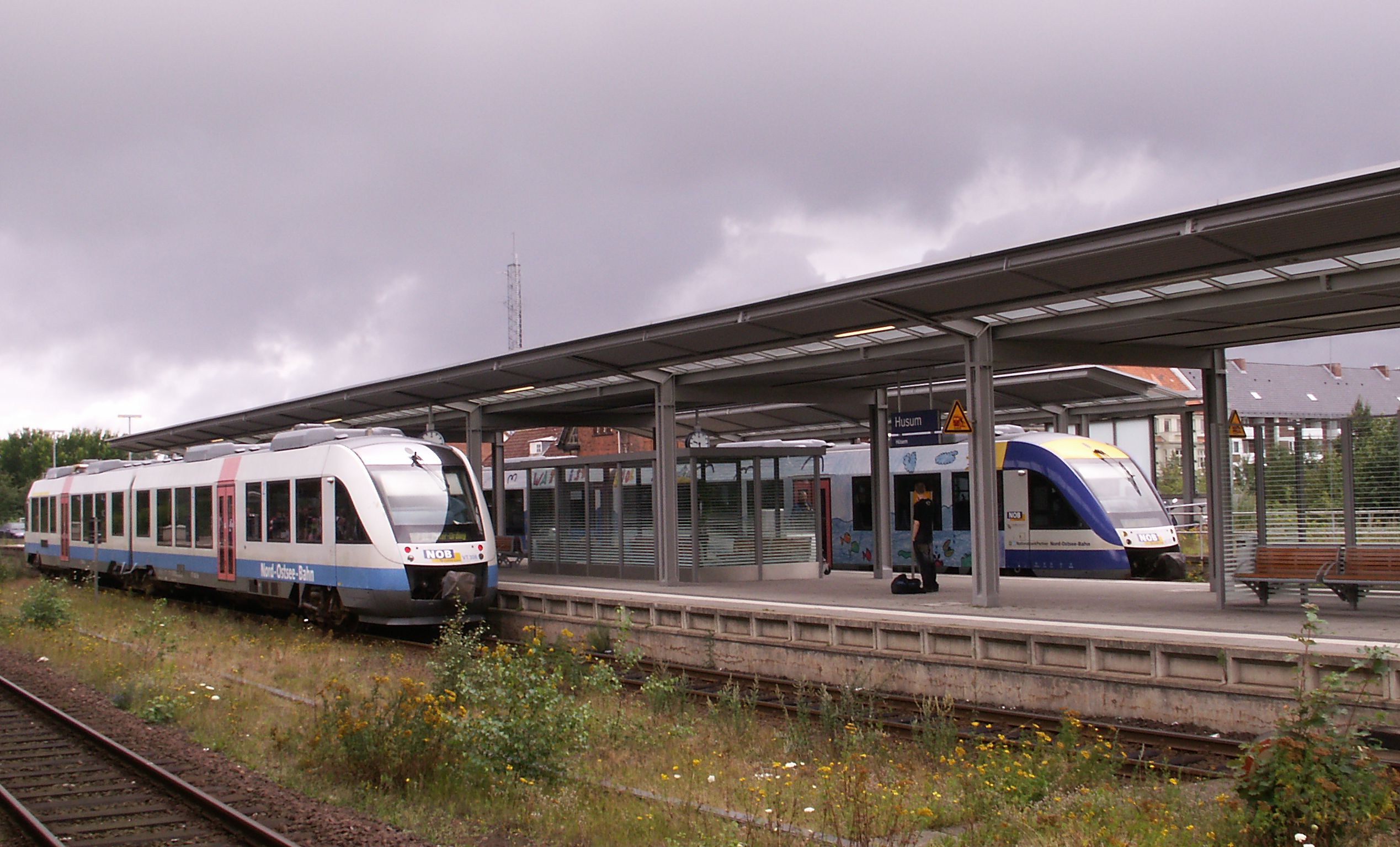 Inselbahn Sylt